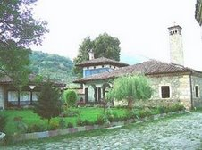 Tekke in Tetovo